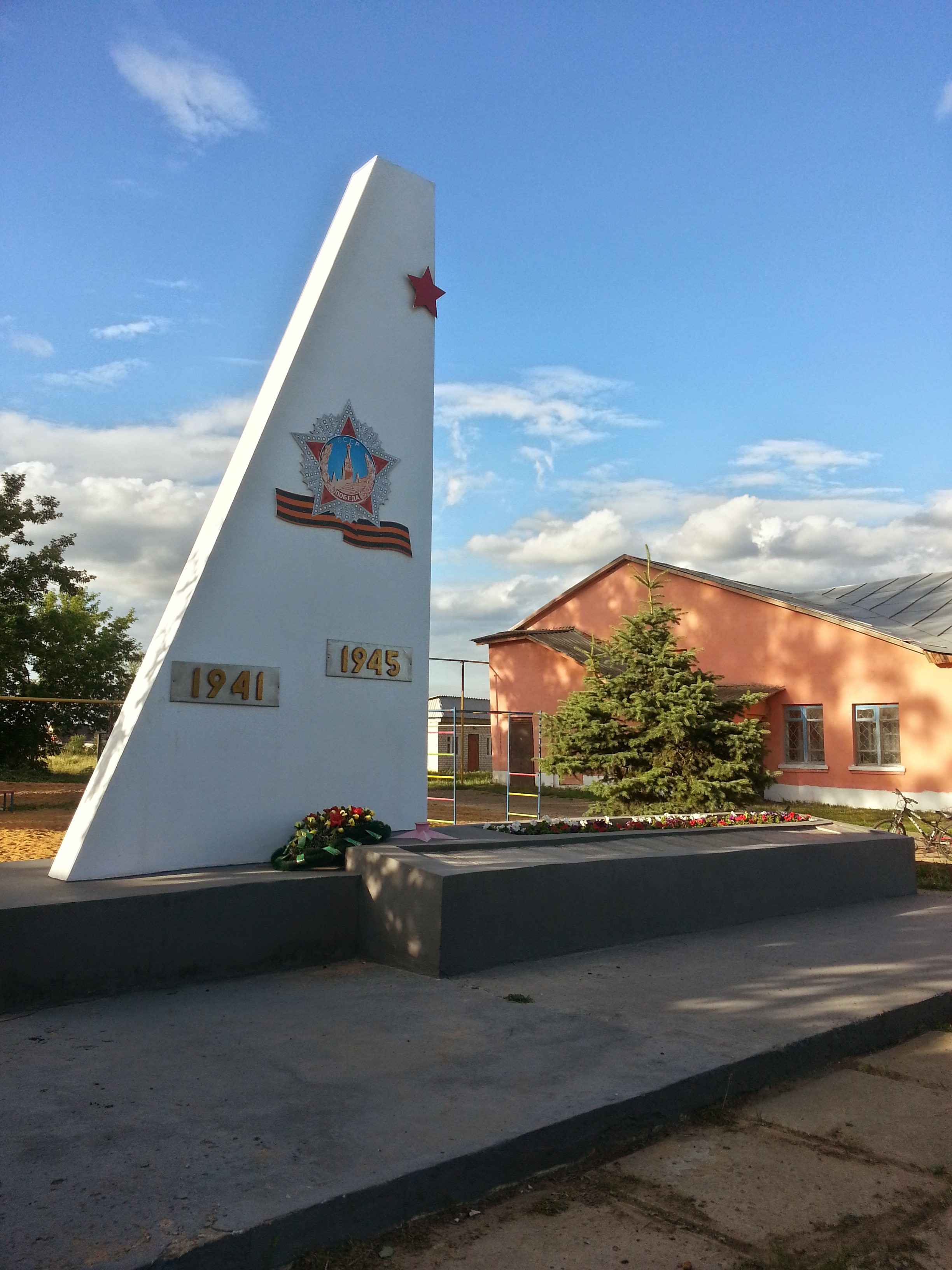 Bokino, Tambovskaya oblast', Russia